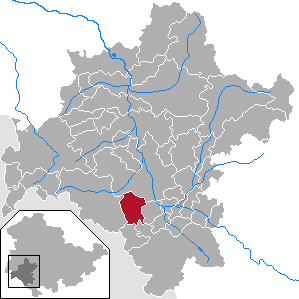 Sülzfeld in Thuringia - District Schmalkalden-Meiningen